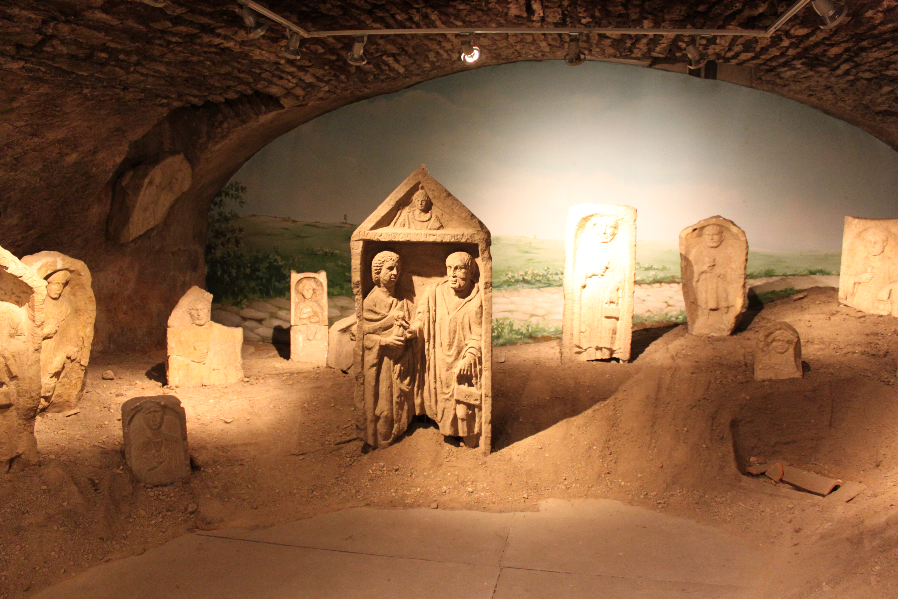 Le Musée d'Histoire et d'Archéologie, Nuits-Saint-Georges, Côte-d'Or, Bourgogne, France